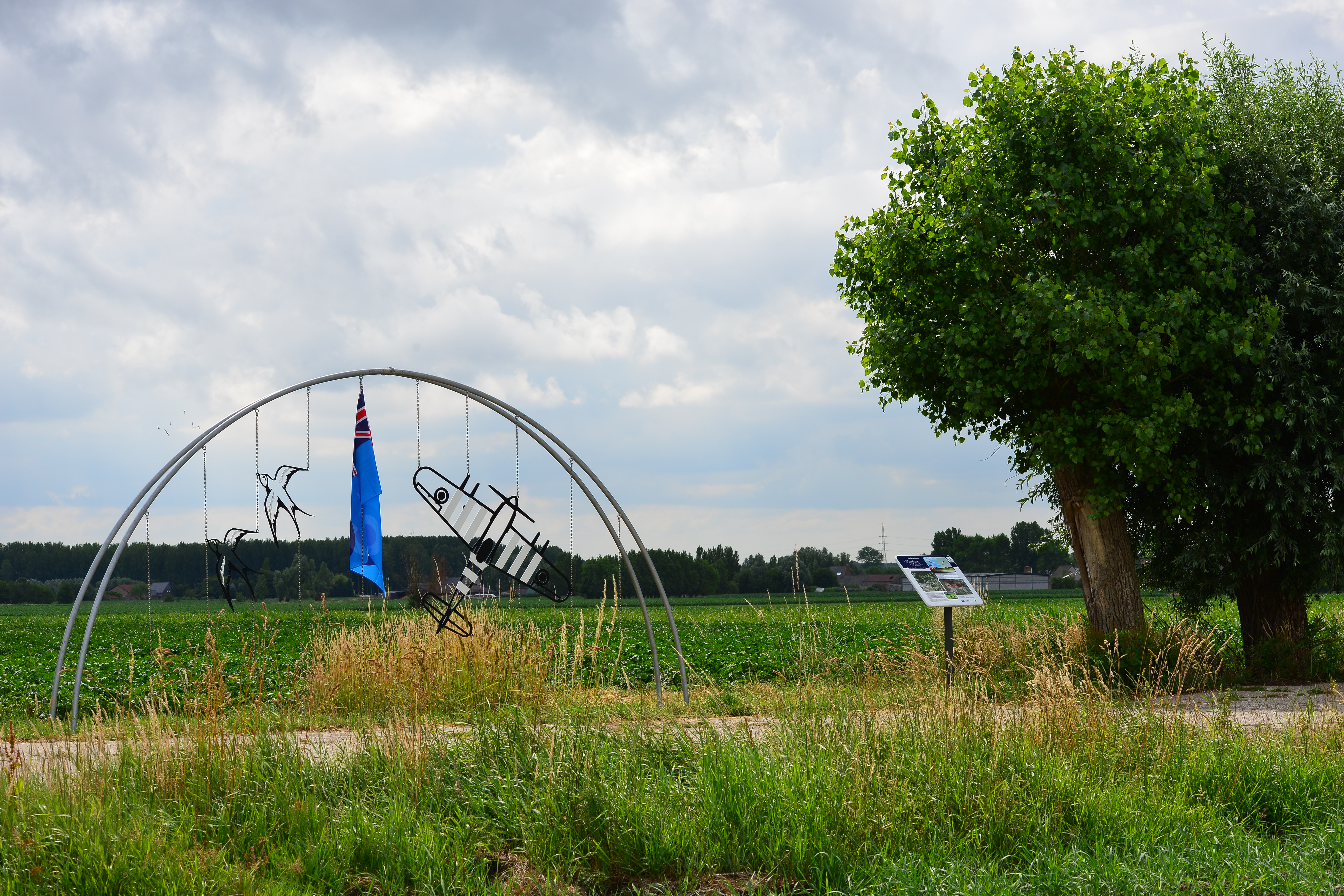 Monument, opgericht ter nagedachtenis van bemanningen en personeel van het oorlogsvliegveld B-67 te Ursel, Knesselare.